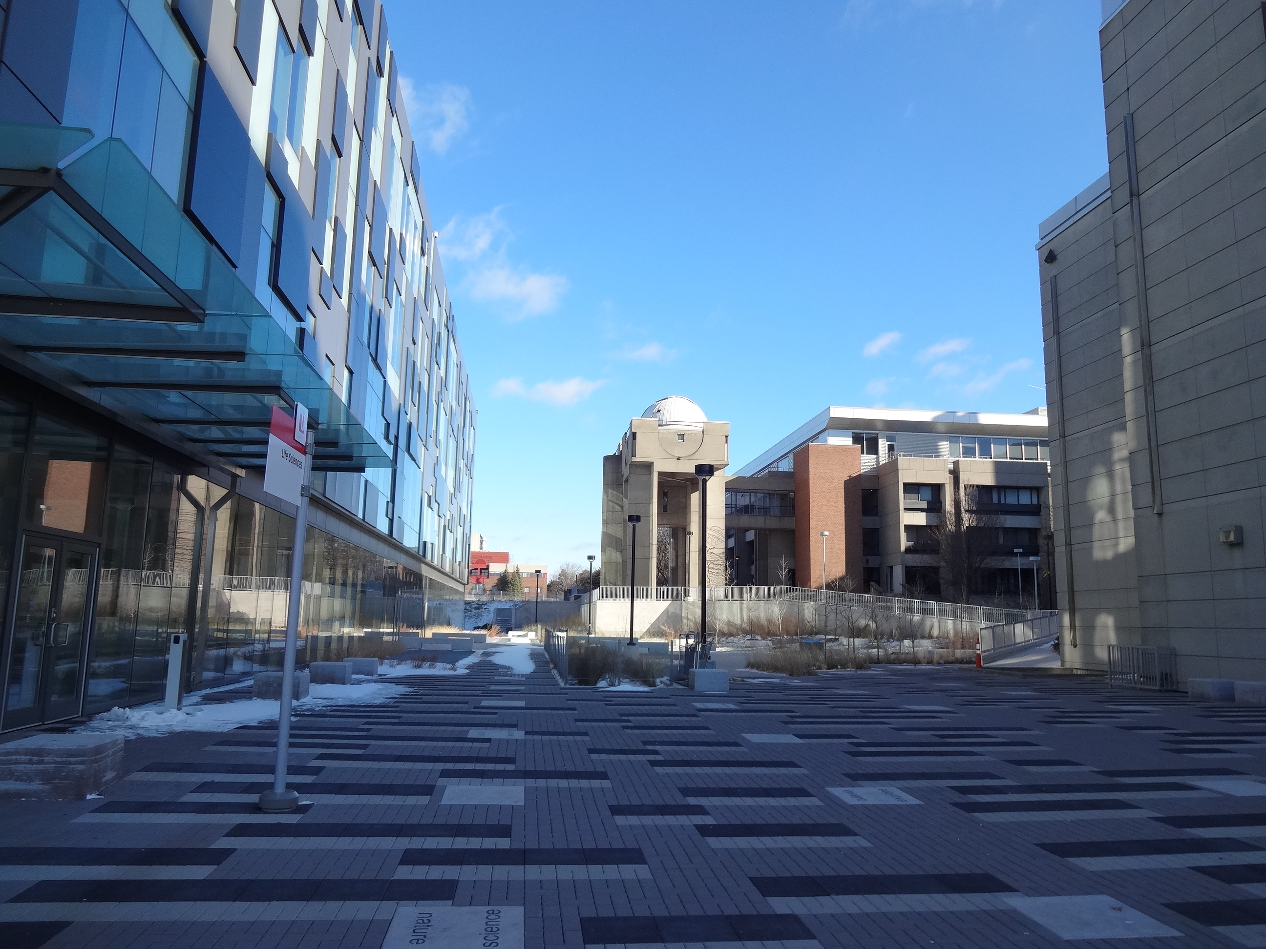 Neve na York University.